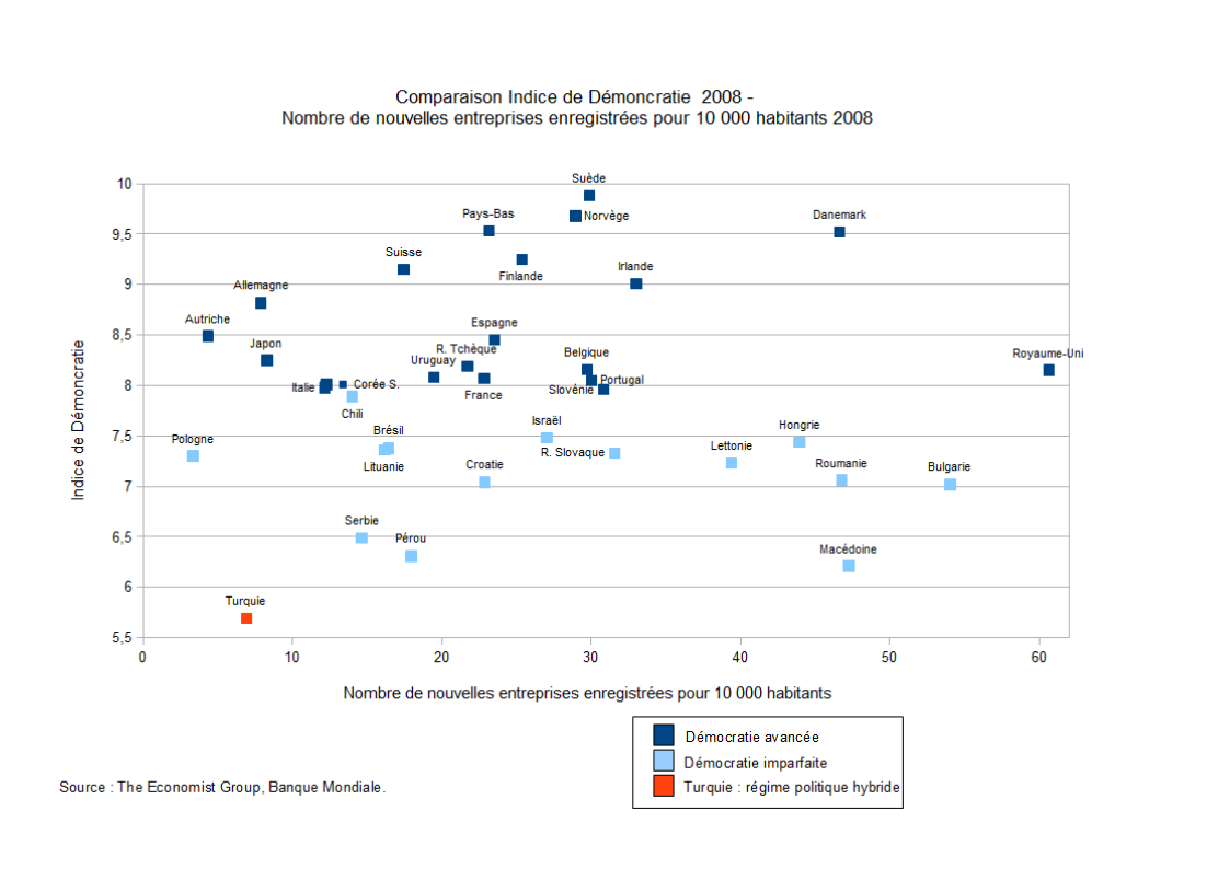 Entrepreneuriat et Indice de Démocratie en 2008 - Source: The Economist Group, Banque Mondiale